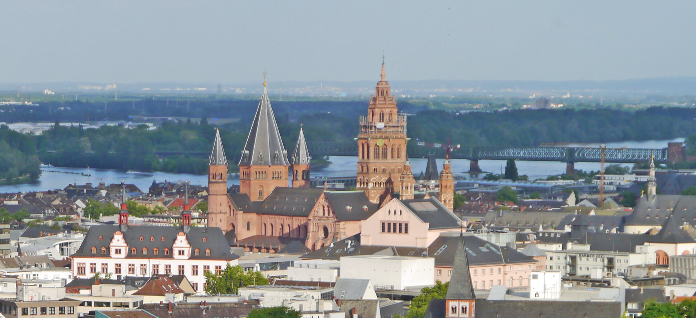 Die "Alte Universität", der Mainzer Dom und das "Staatstheater", 2015 in der Mainzer Altstadt vom Bonifaziusturm A aus gesehen. Im Hintergrund fließt der Rhein von rechts nach links an der Mainmündung vorbei.